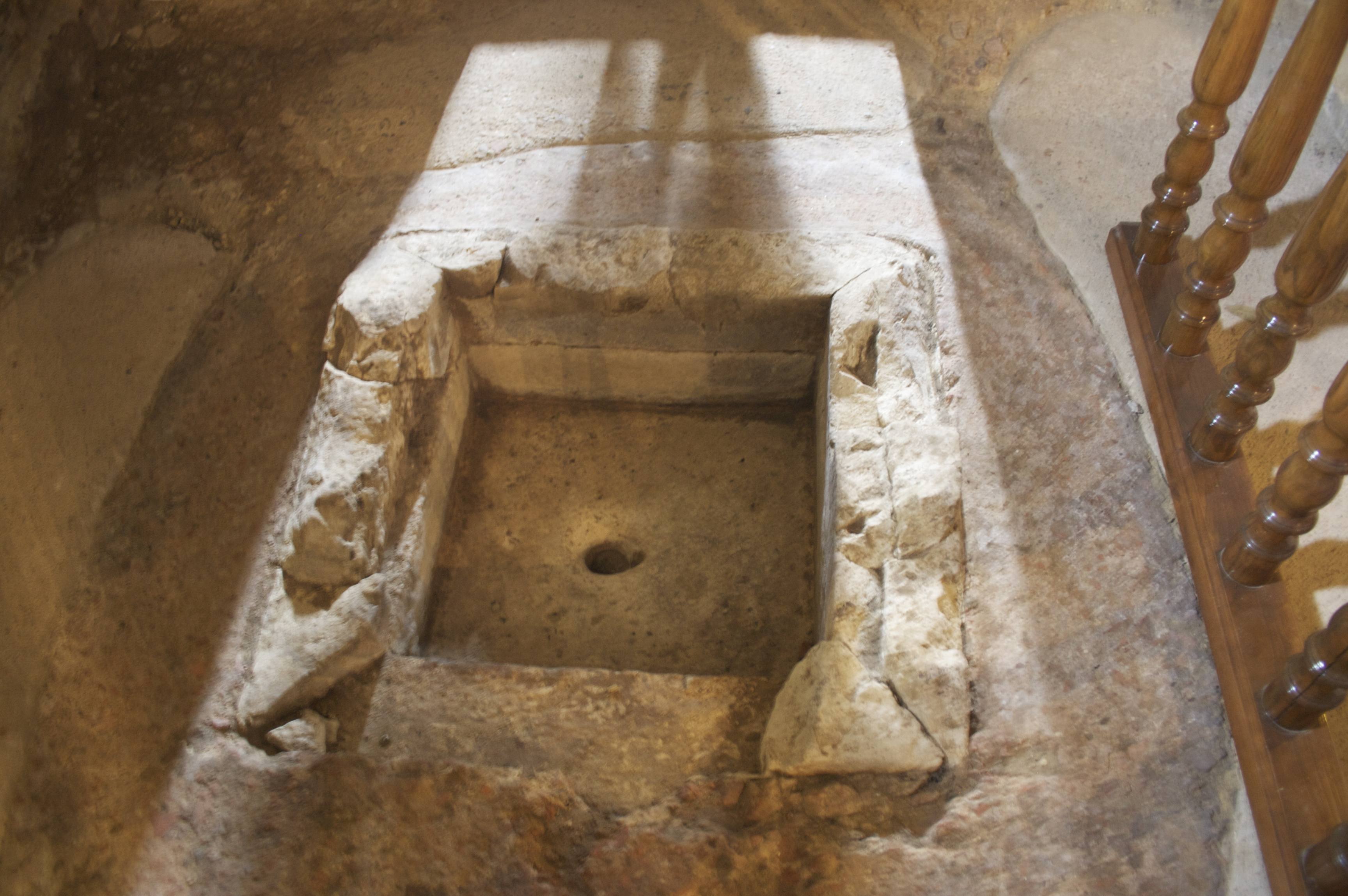 Baptisterio encontrado tras las obras de restauración en la iglesia prerrománica de Santianes de Pravia del siglo VIII